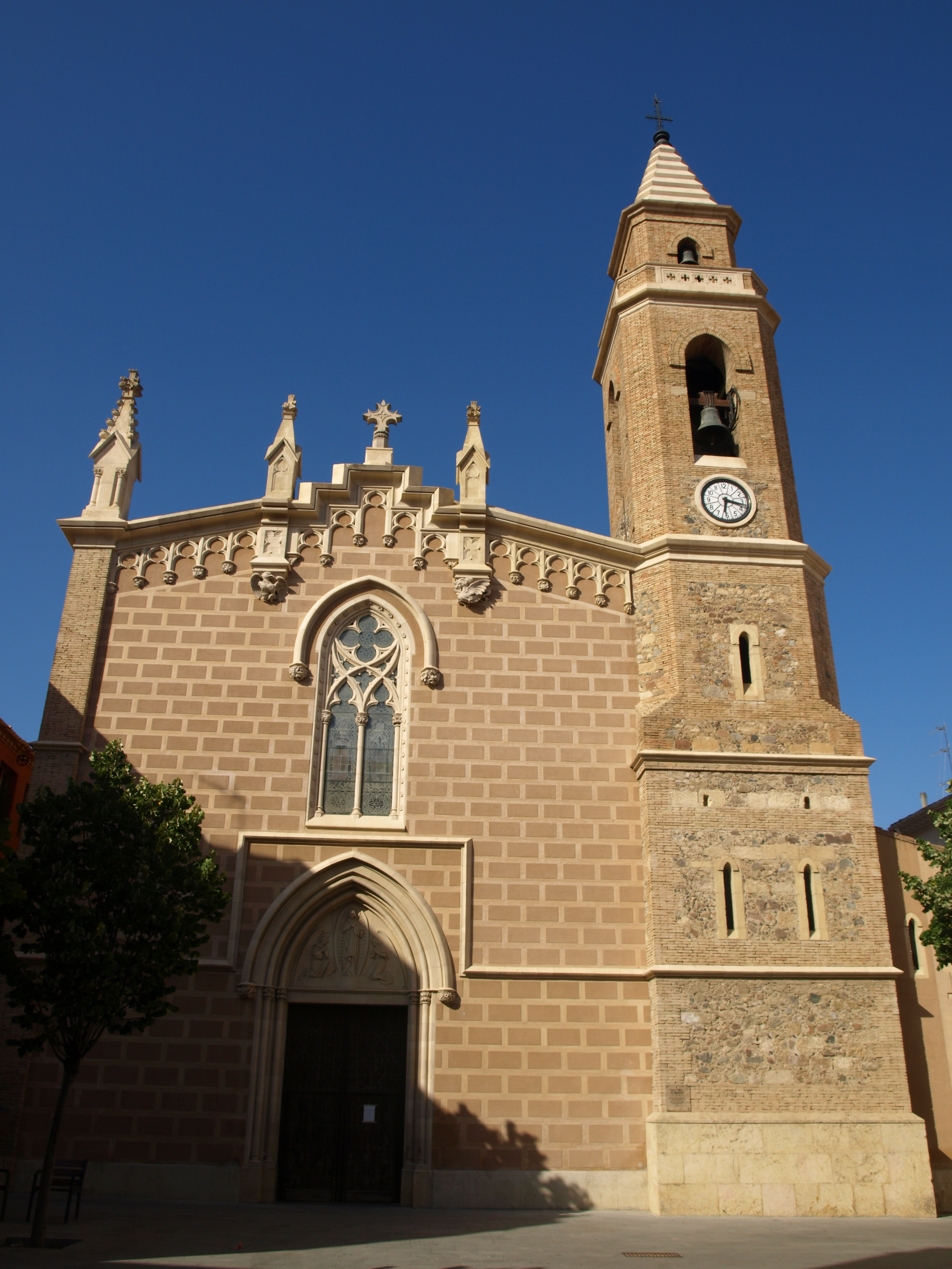 Iglesia parroquial de Santa María de Cambrils (Tarragona, España)